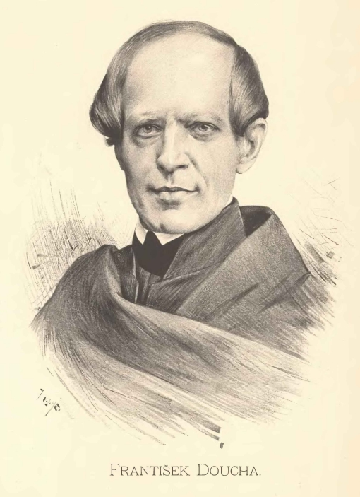 Portréty předních osobností od Jana Vilímka